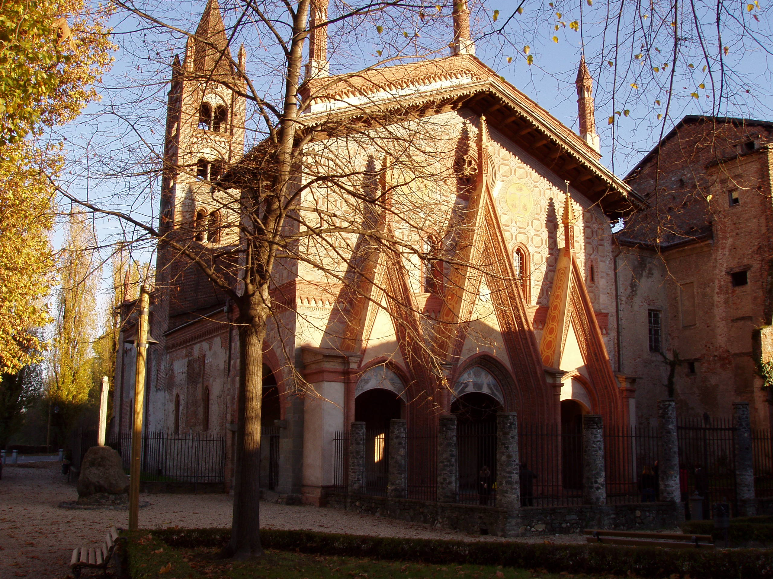 Facciata di Sant'Antonino di Ranverso (Torino)